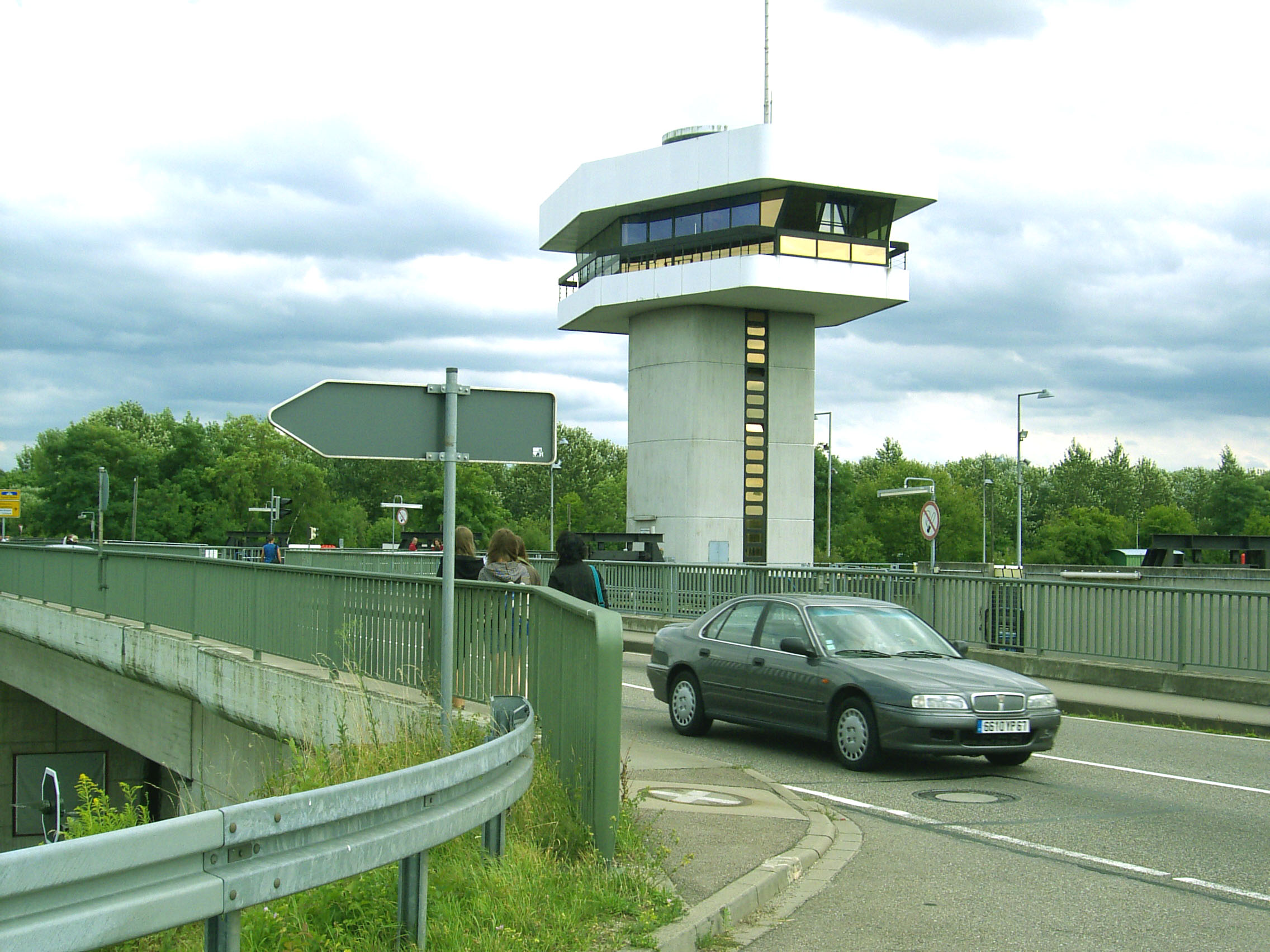 Sterówka na śluzie w Iffezheim